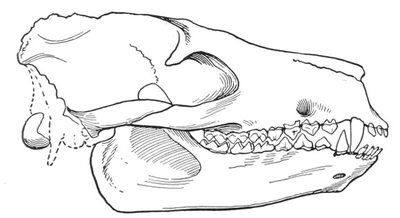 Protoreodon parvus skull